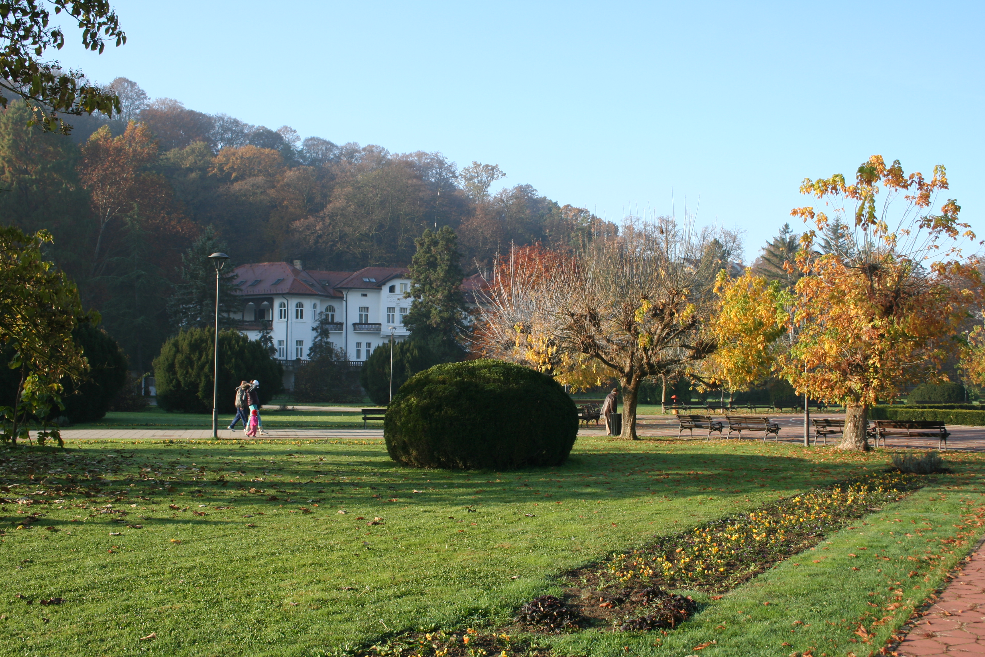 Specijalna bolnica za rehabilitaciju Banja Koviljača